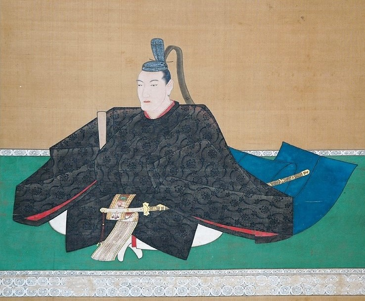 毛利治親の肖像(部分)。